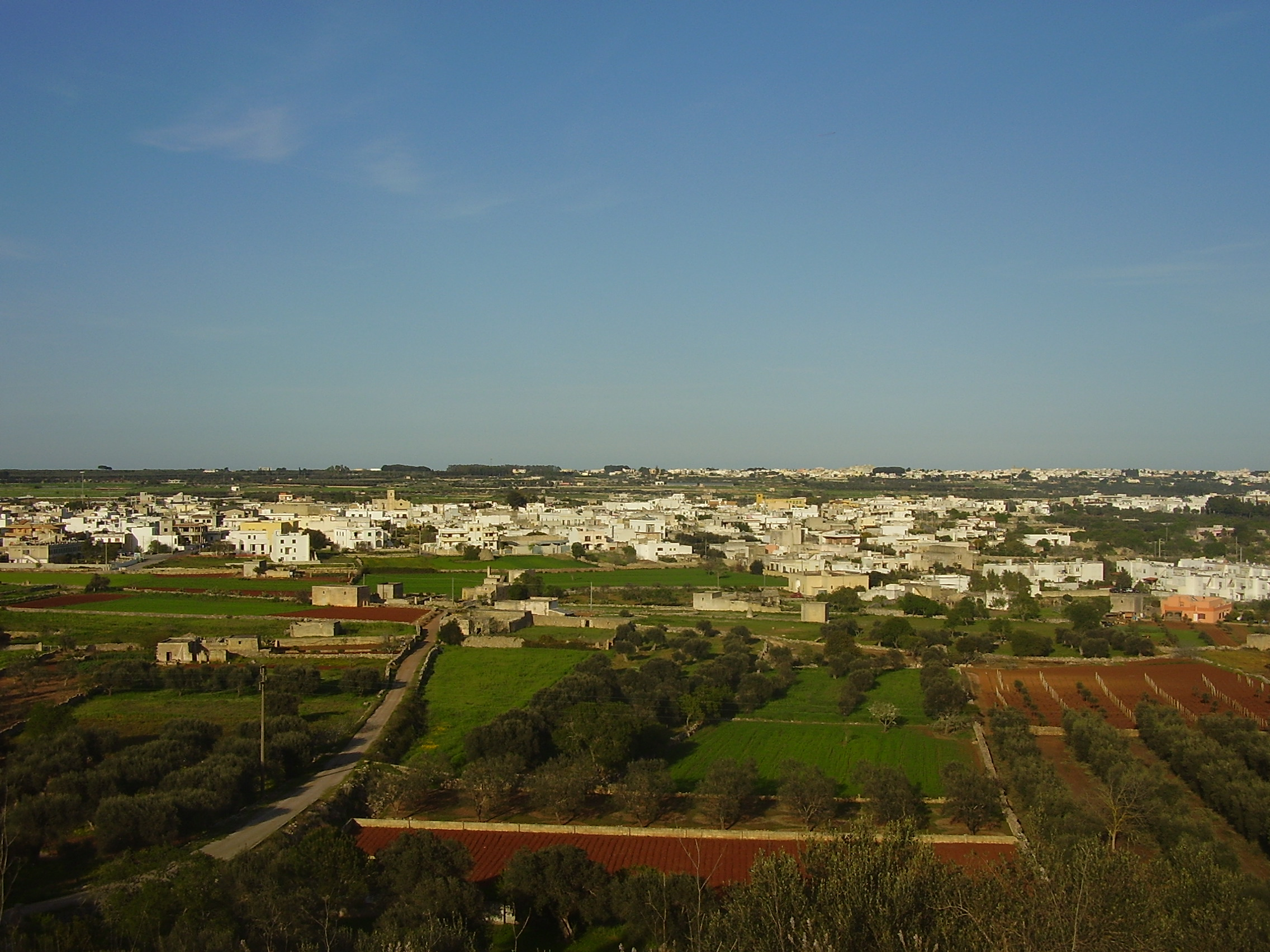 Panorama dell'abitato di Patù, Lecce